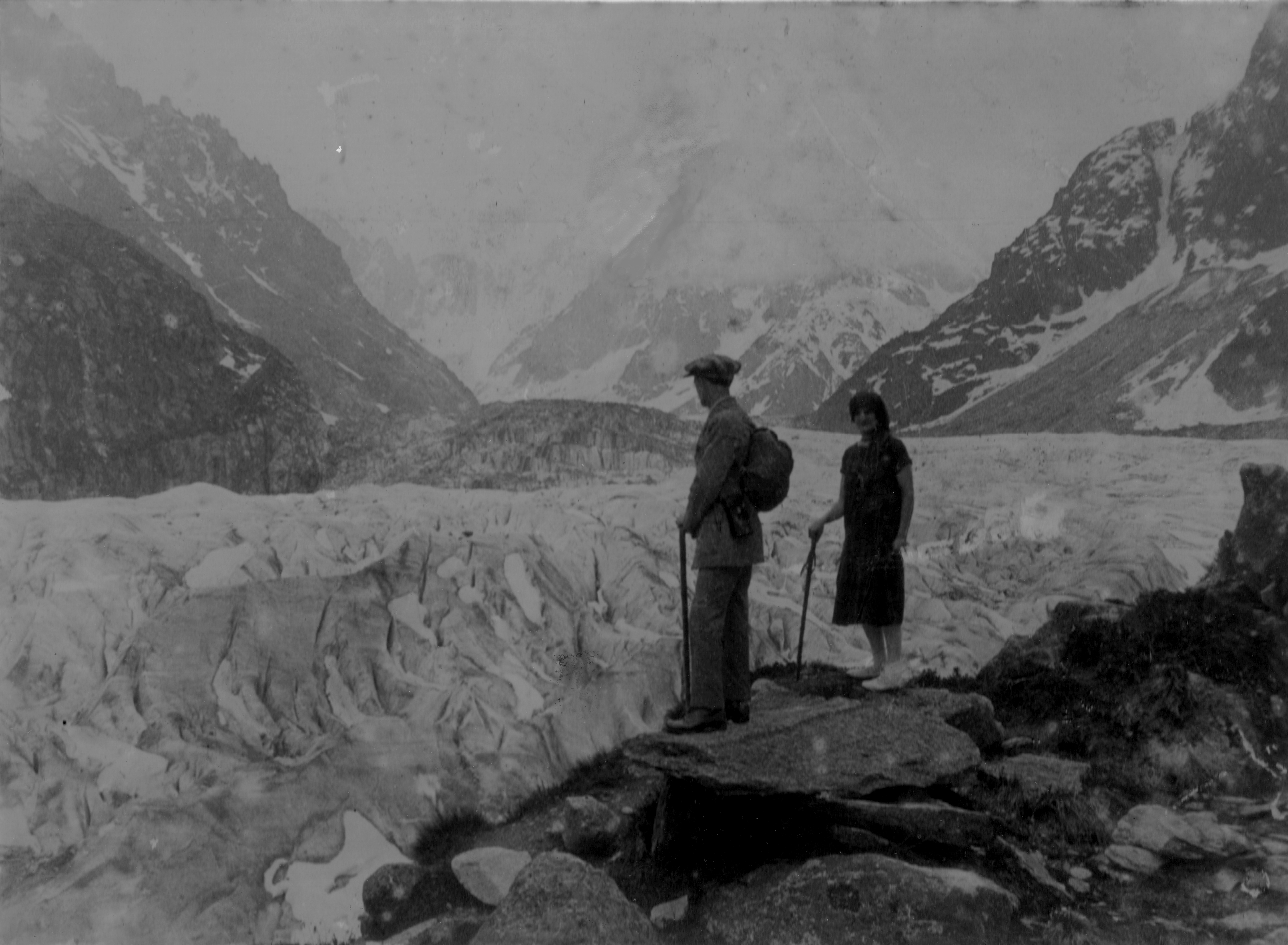 La mer de glace, Chamonix, Haute-Savoie, France. Photo prise non loin de la gare de Montenvers